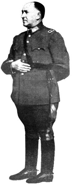 General Ariosto Herrera, que intento un golpe de Estado en Chile el 25 de agosto de 1939 contra el Presidente Pedro Aguirre Cerda: El "Ariostazo".